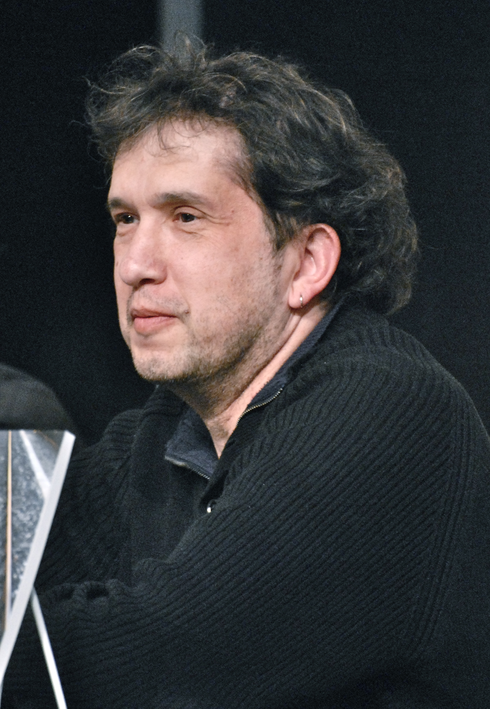 Joan-Lluís Lluís, lors du Salon international du livre de Québec 2012